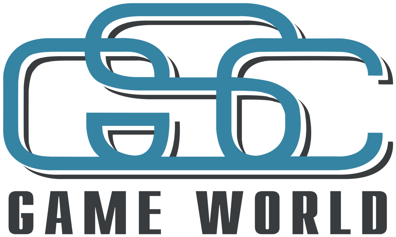 GSC Game World logo